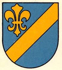 Wappen von Coeuve Kanton Jura Schweiz